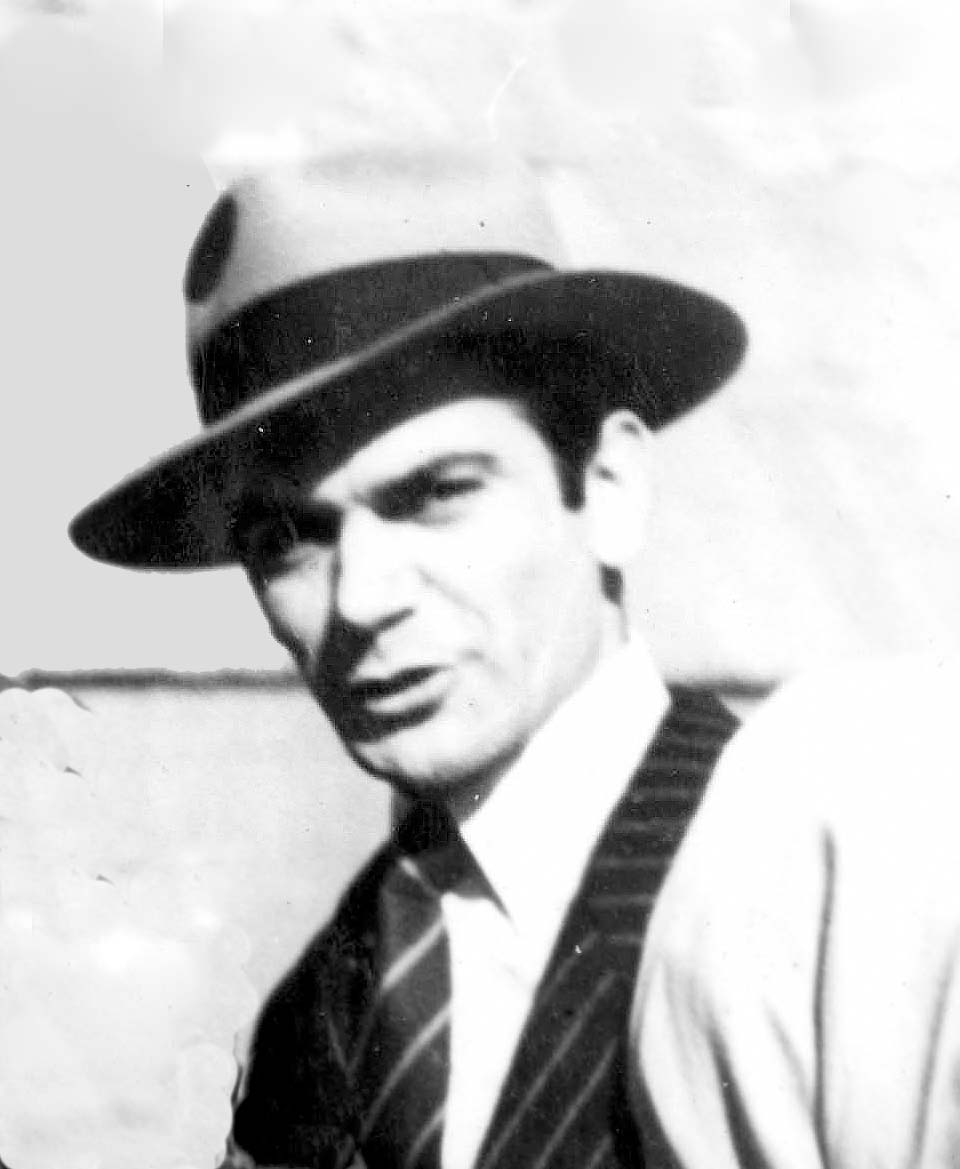 Mauricio Espósito, actor argentino.